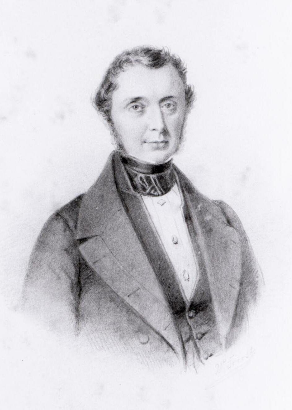 Portret van Jhr. Daniel de Blocq van Haersma de With (1797-1857). Lithografie van Willem Troost, gedrukt door Elias Spanier. Gedateerd 1825-1840 op basis van kostuum.